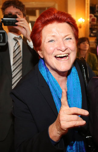 Ursula Pasterk, Helene Maimann-8431